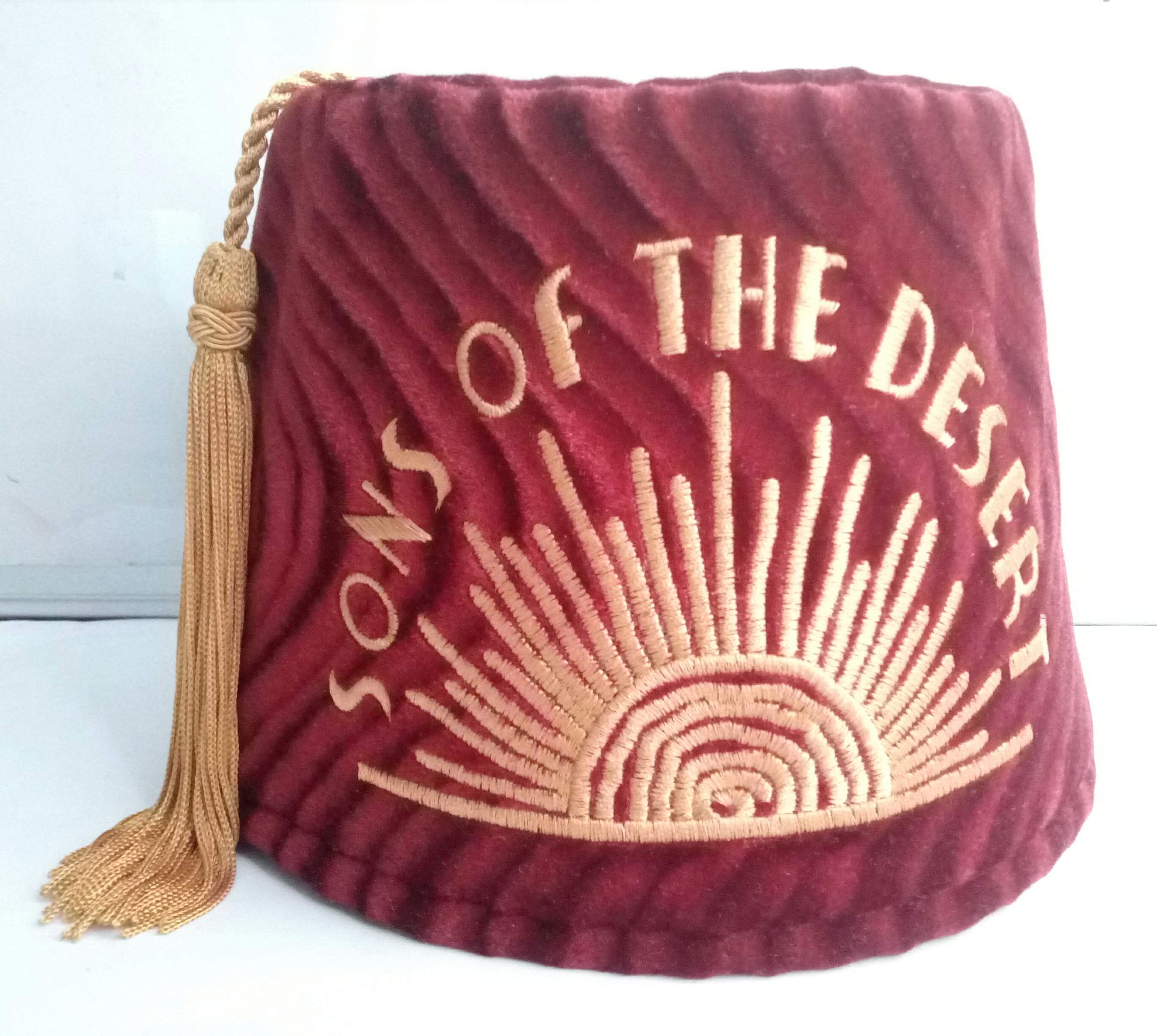 Fez van de Sons of the Desert organisatie